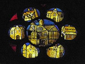 Figuration du Doyenné de Champeaux. Vitrail de la chapelle Saint-Pierre de la Collégiale Saint-Martin de Champeaux (77).